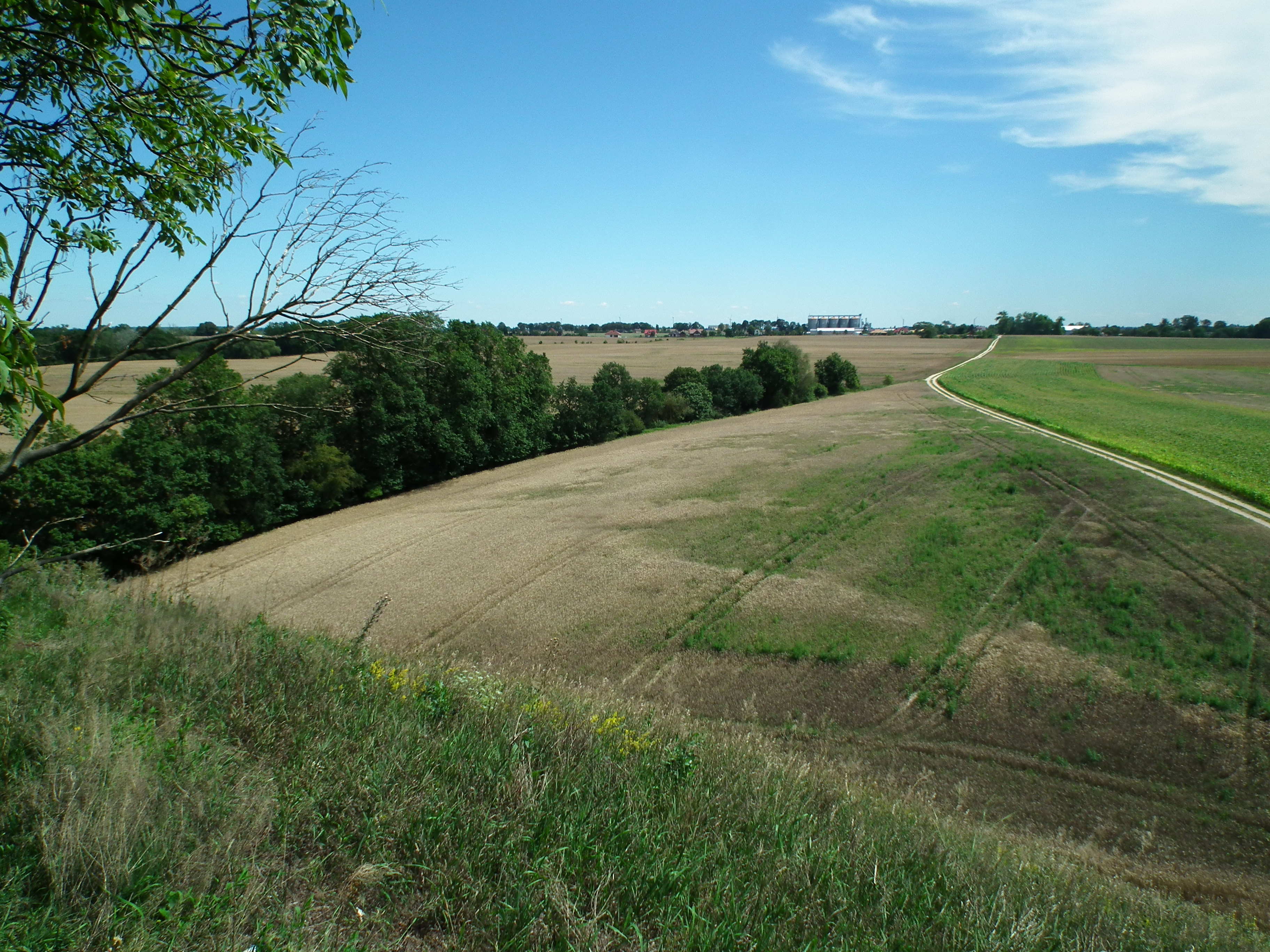 Góra Św. Wawrzyńca pod Chełmnem (grodzisko).